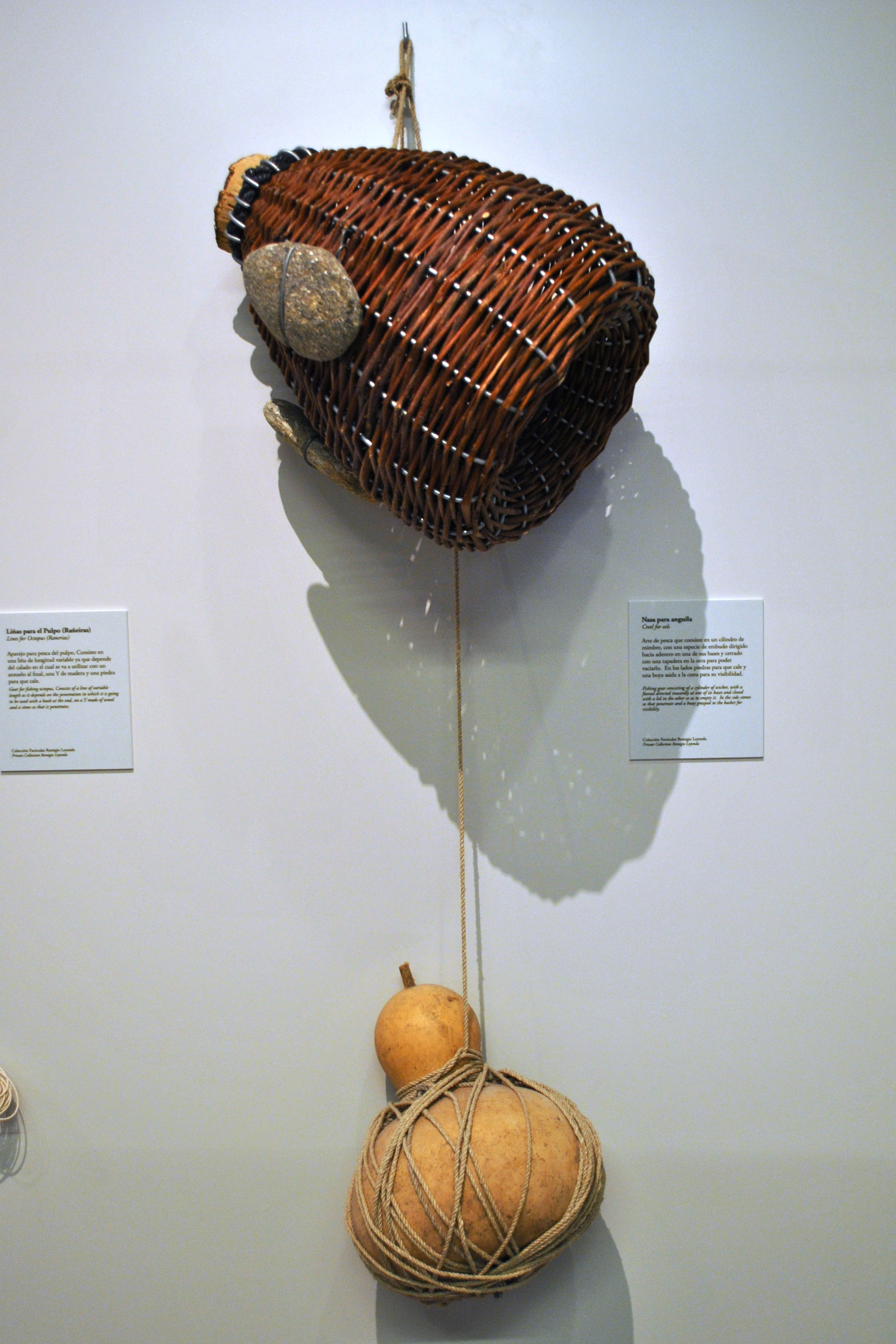 Véxase o título e as categorías